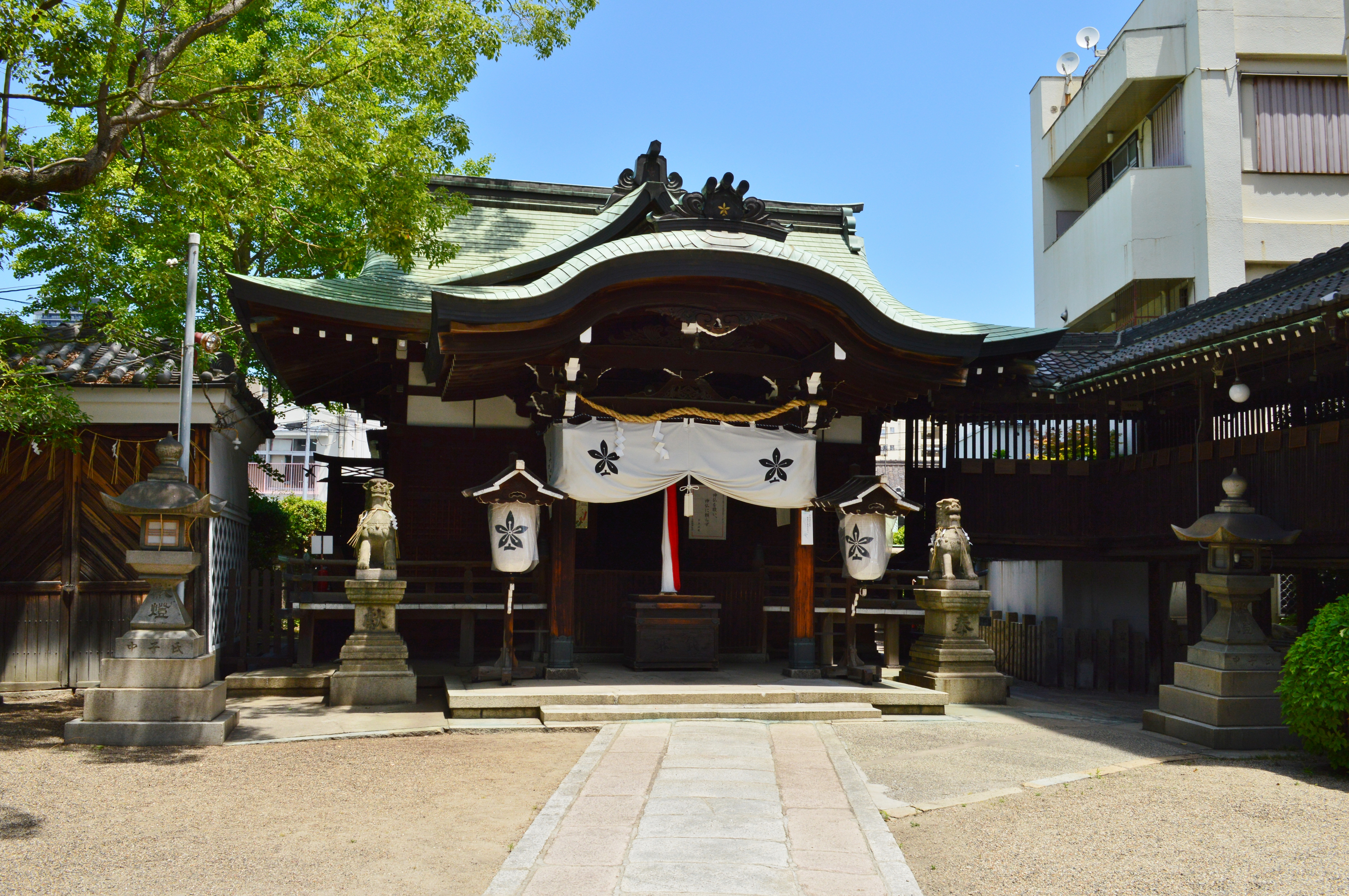 比売許曽神社 拝殿